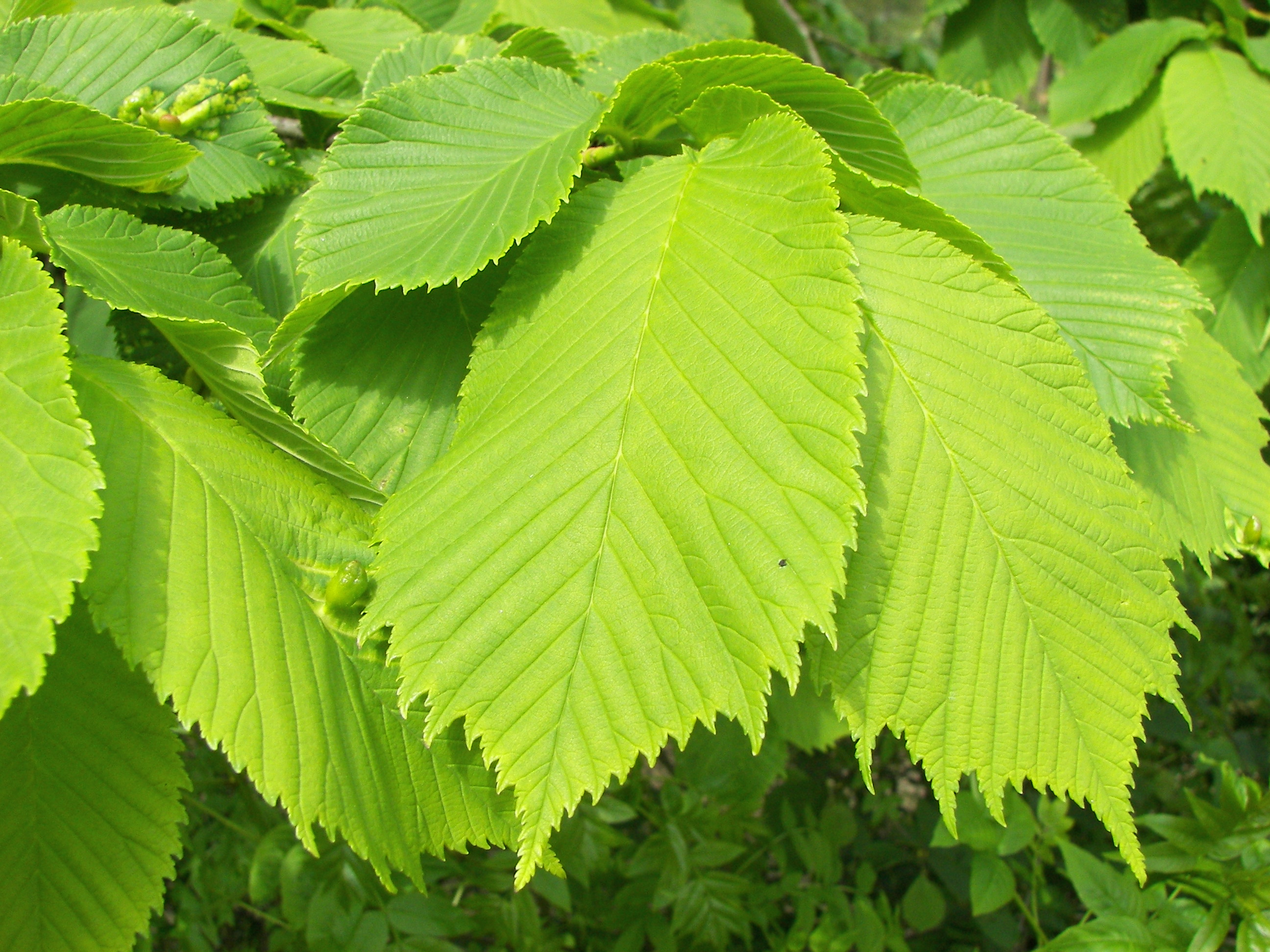 Bergulme (Ulmus glabra) bei Cölbe, LK Marburg-Biedenkopf, Hessen, Deutschland